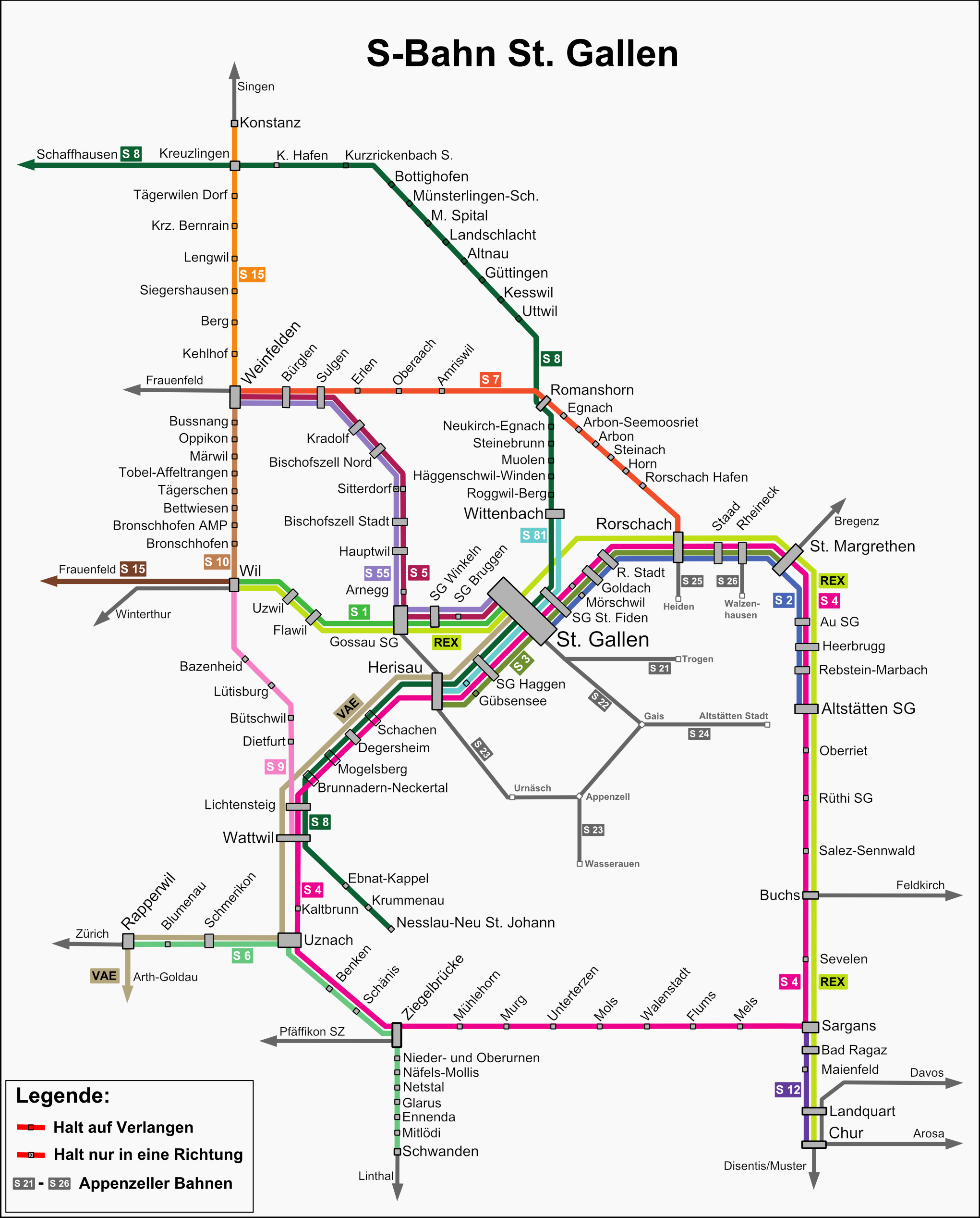 Netzplan der S-Bahn Sankt Gallen